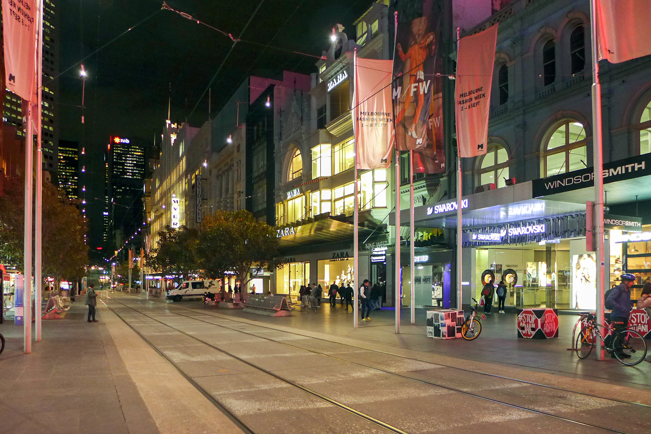 Bourke Street Mall night view